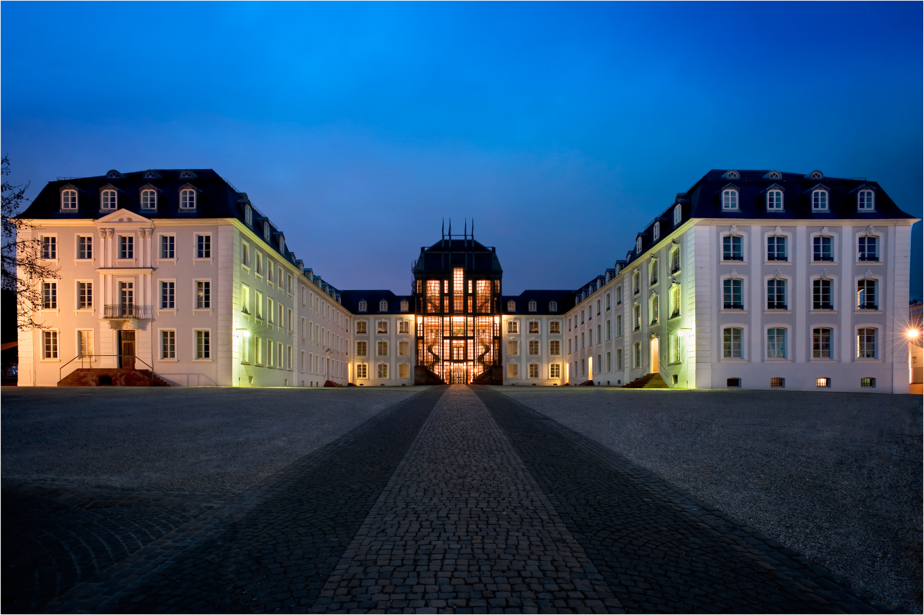 Saarbruecker Schloss zur "blauen Stunde" an einem Sonntagmorgen aufgenommen